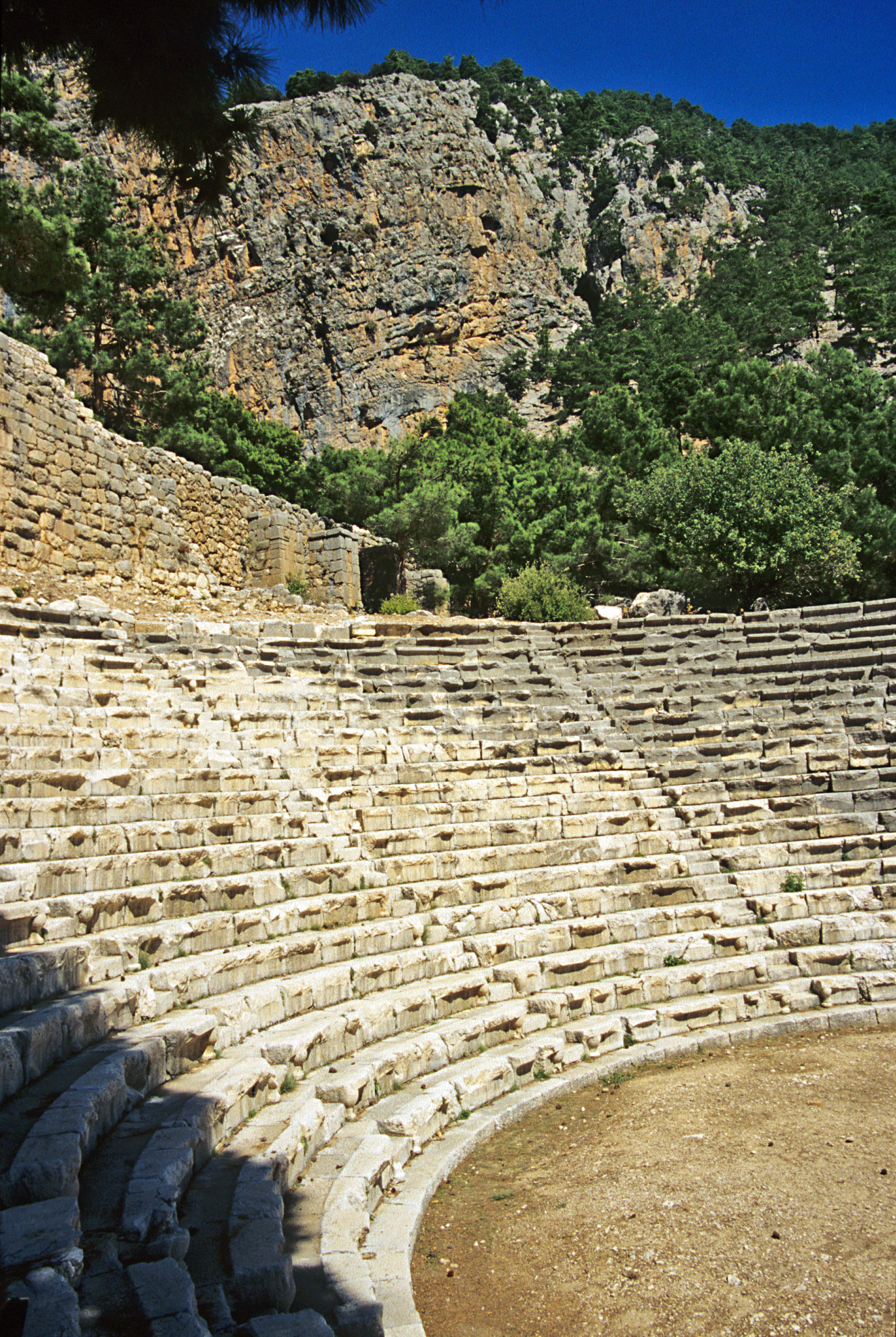 Arykanda, Südtürkei, Theater